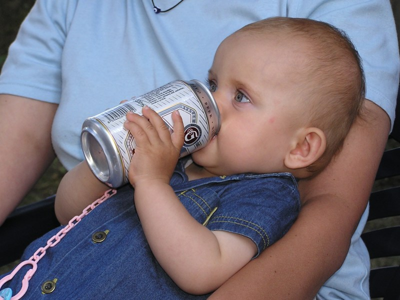 Alkohol dětem nepatří